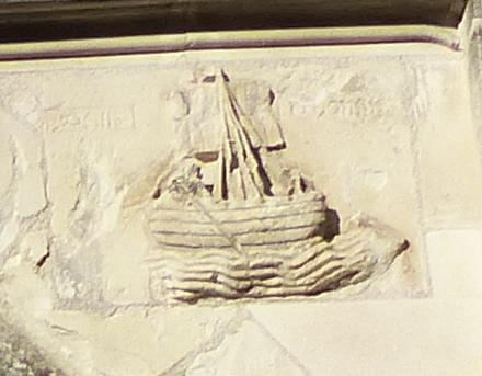 Bateau gravé sur le portail de l'église Saint-Symphorien de Fondettes